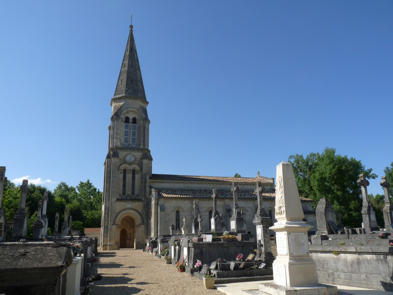 Eglise, cimetière et monument aux morts, Sablons, Gironde, France